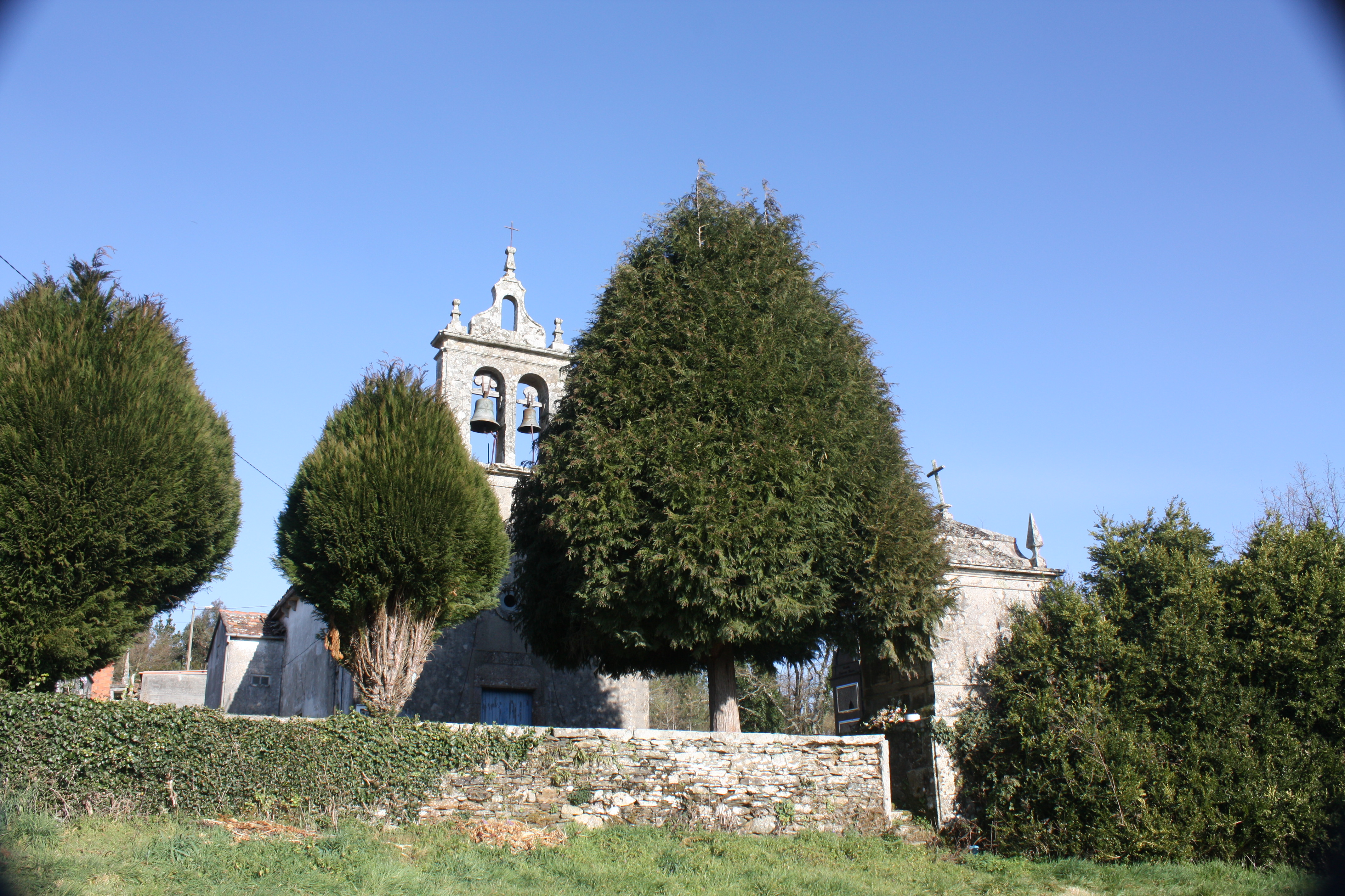 Igrexa parroquial de San Pedro da Baíña (Agolada, Pontevedra)